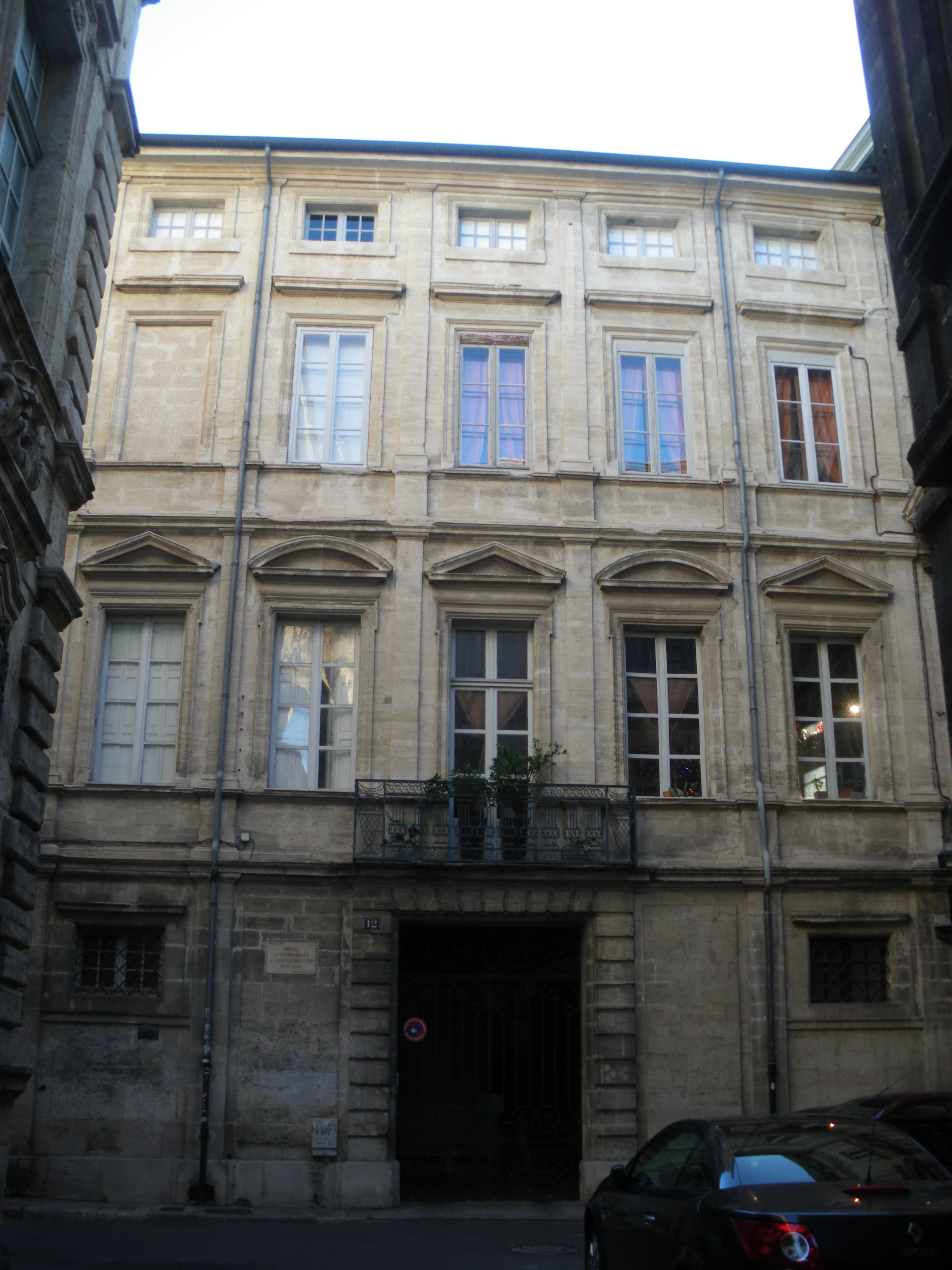 Avignon (Vaucluse, Provence, France), 12 rue du Roi René, hôtel Honorati de Jonquerettes.